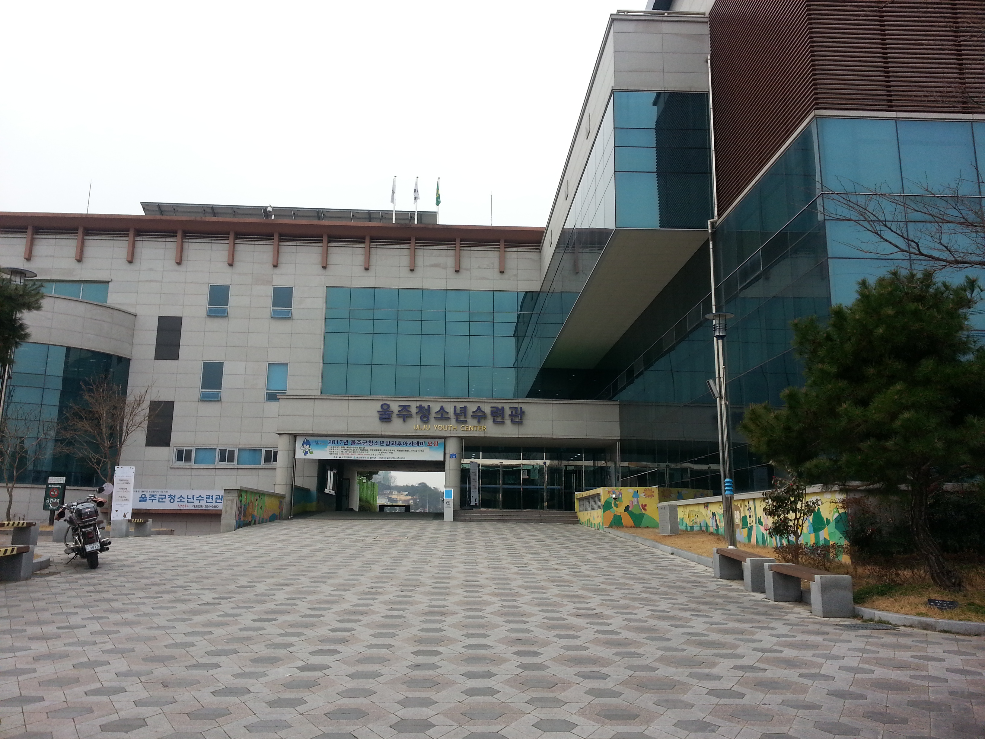 청소년 수련관 전경, 사회복지기관, 청소년 복지시설